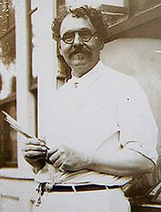 Self-portrait